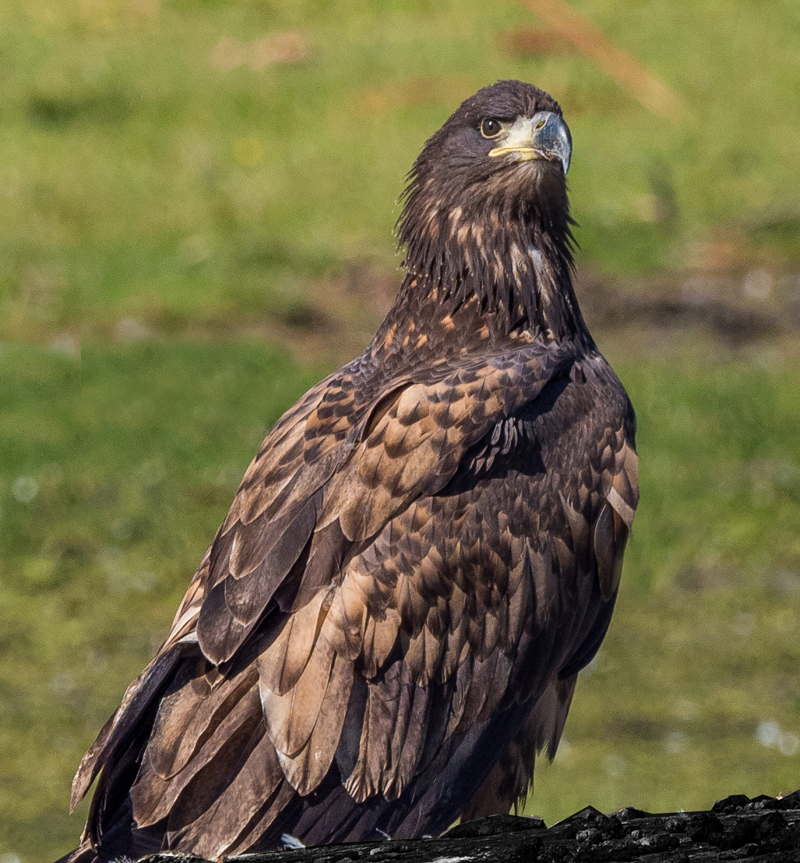 Haliaetus albicilla